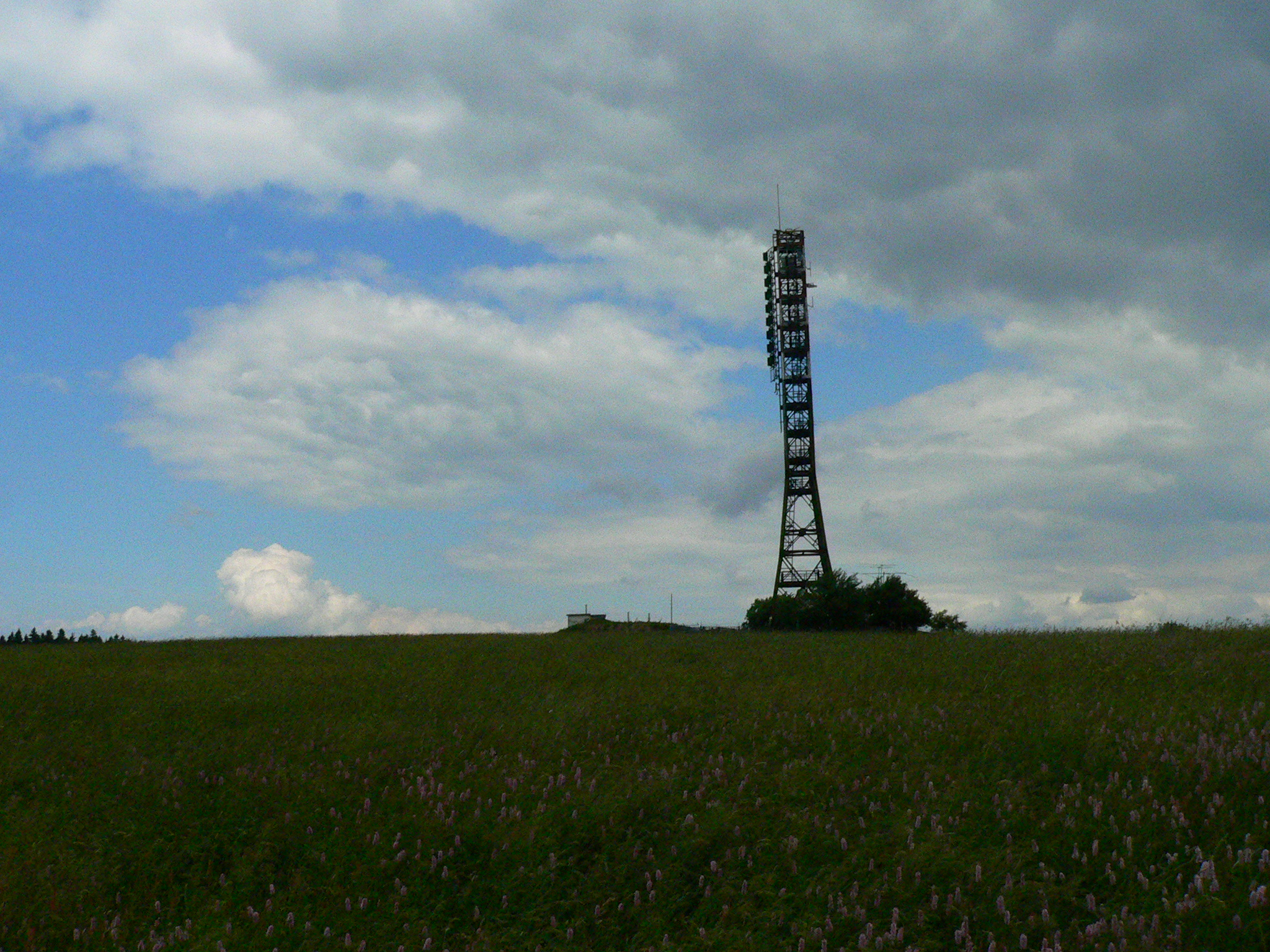 Berg "Ellenbogen" in der Rhön (Thüringen) - Sendeanlage